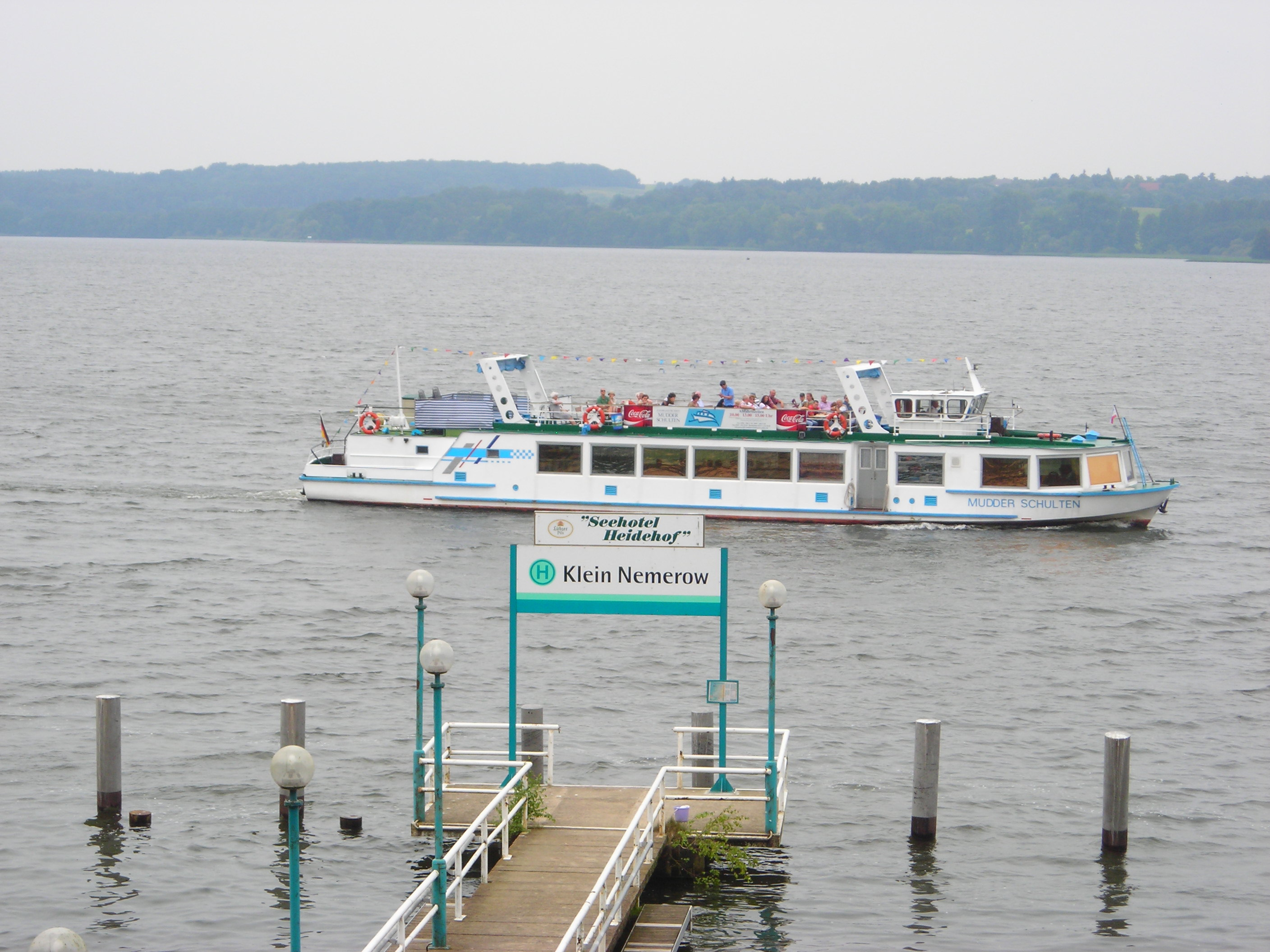 Motorschiff Mudder Schulten auf dem Tollensesee beim Anleger von Klein Nemerow